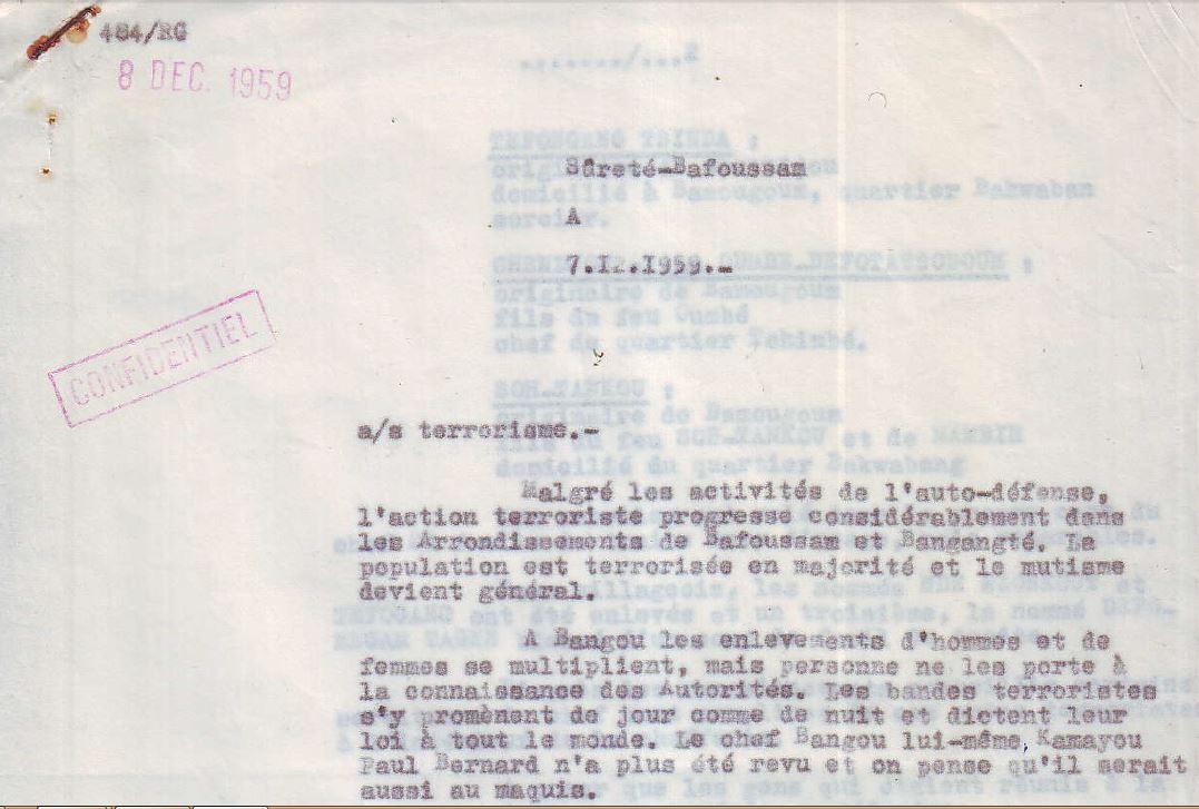 Note confidentielle issue par l'administration coloniale concernant l'exil du Roi Paul-Bernard Kemayou, 12ème Roi de Bangou, homme politique et résistant anticolonialiste camerounais